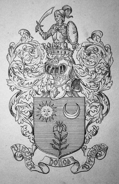 D'azur, à un lis de jardin d'or, tigé et feuillé de sinople, accompagné en chef à dextre d'un soleil d'or et à senestre d'un croissant d'argent. Casque couronné. Cimier: un homme d'armes issant, tenant de sa main dextre un sabre et de sa senestre une rondache. Devise: Vincitur honos virtutibus.